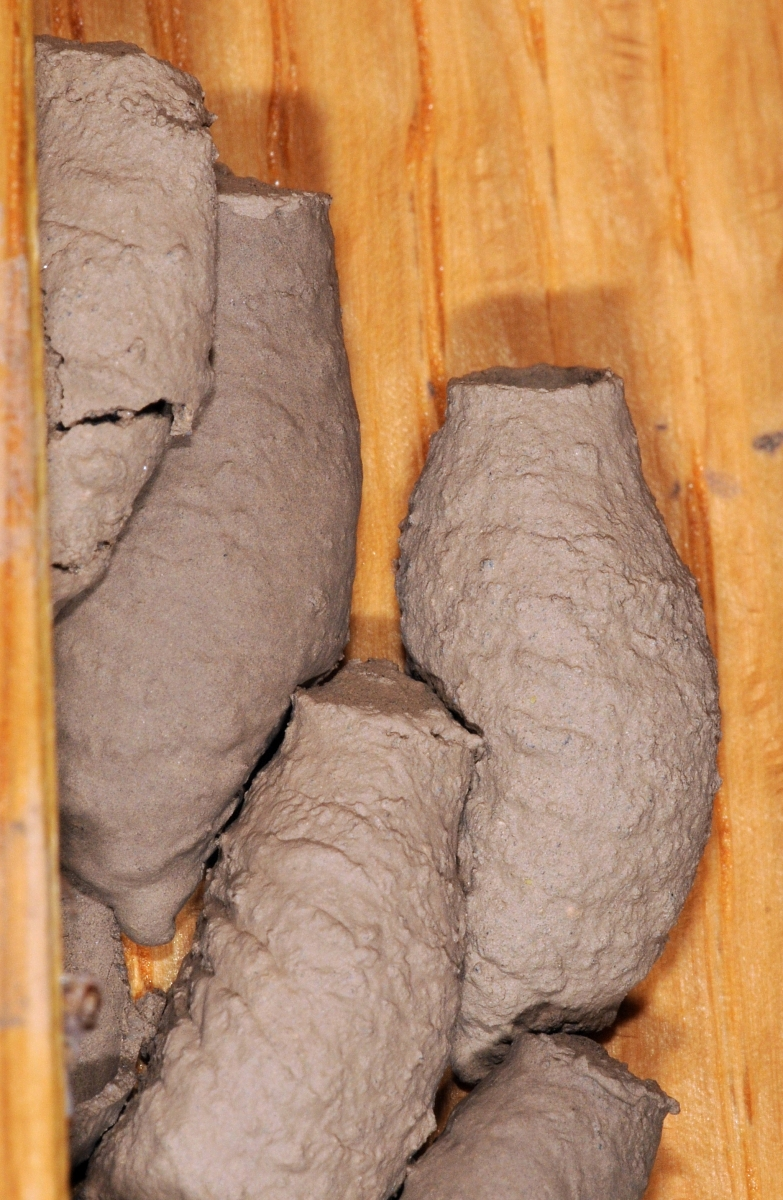 Sceliphron curvatum, Wiesbaden, Hessen, Deutschland